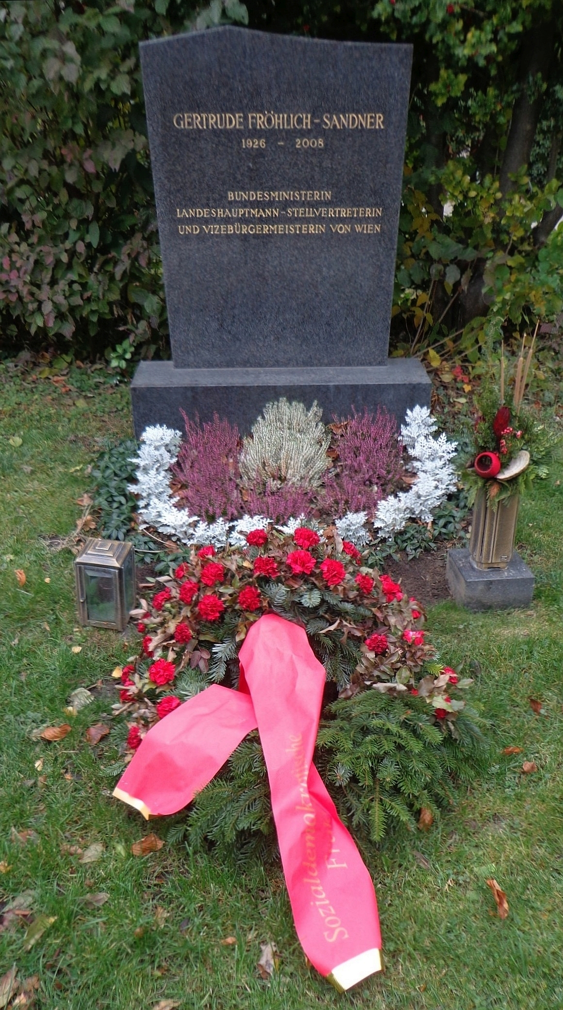 Wiener Zentralfriedhof - Gruppe 32 C, Ehrengrab von Getrude Fröhlich-Sandner